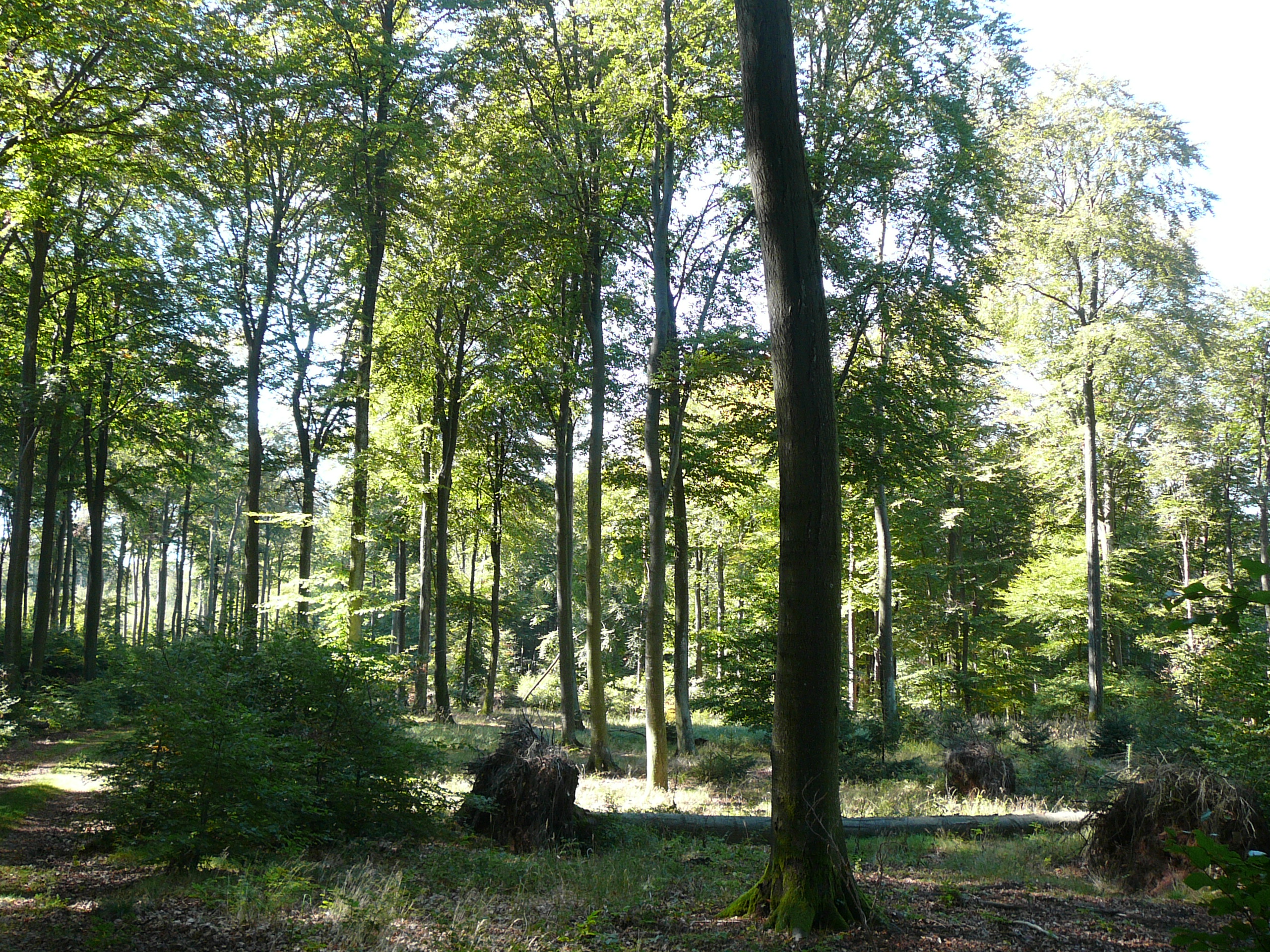 Kernzone des Biosphärenreservates:Urwaldartige Buchenbestände am Westhang des Weißenbergs